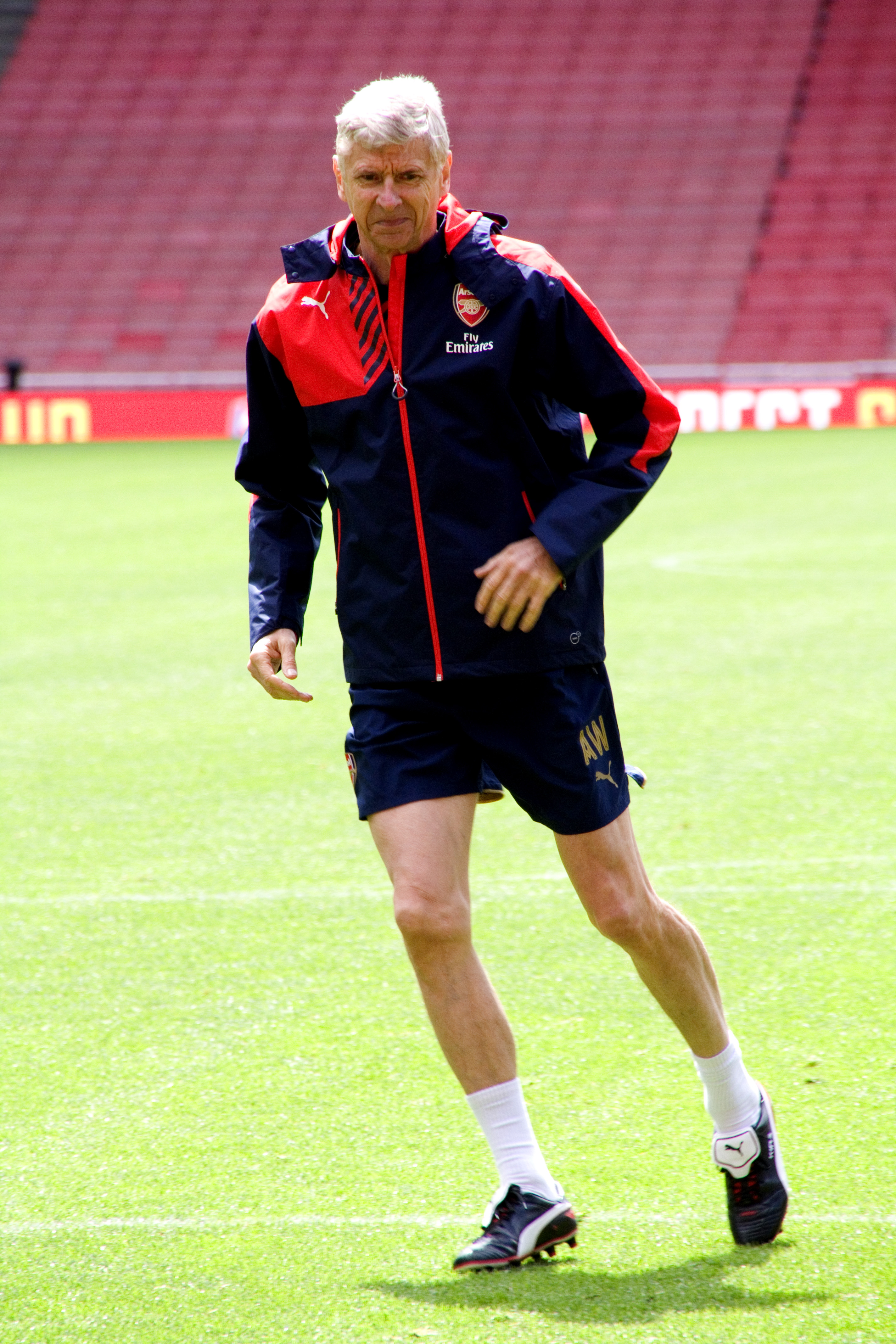 Arsène Wenger during 2015 Arsenal Members Day